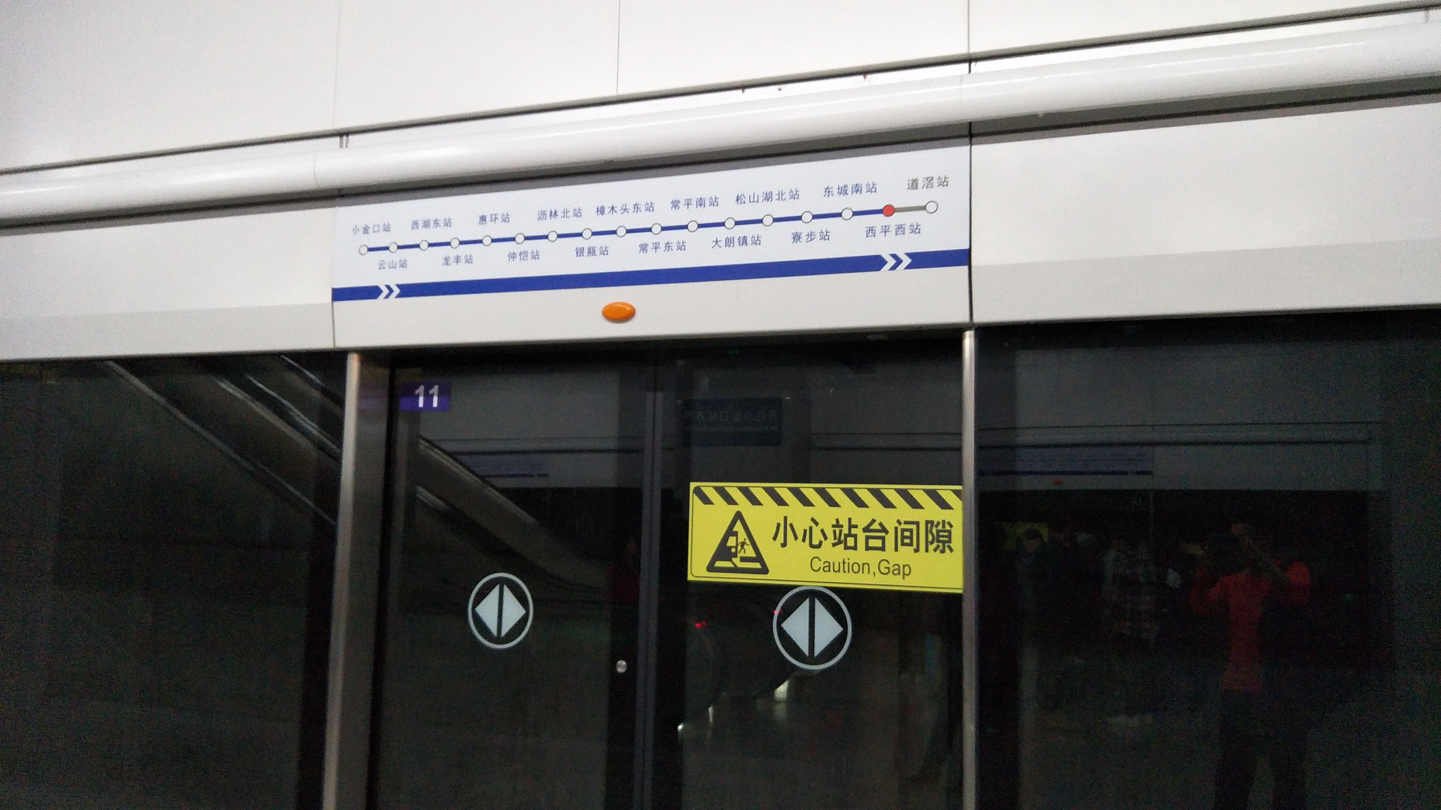 西平西站月台屏蔽门上的线路图